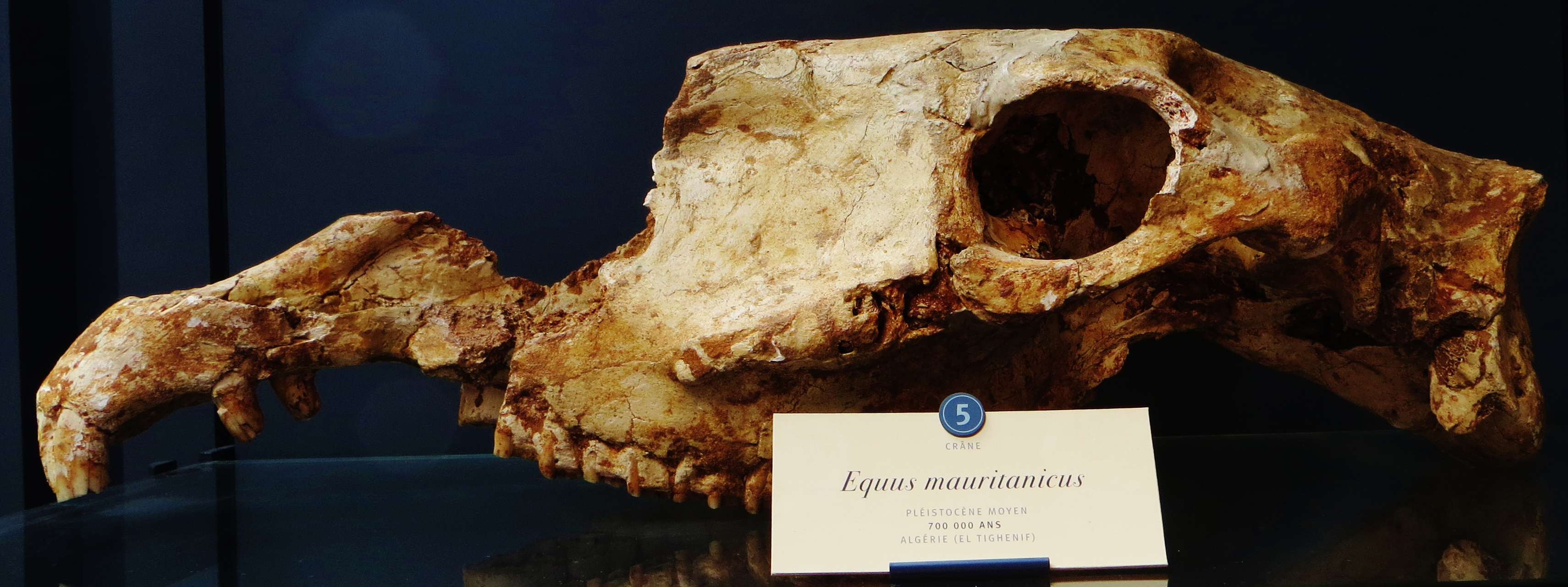 Fossil of Equus, an extinct mammal- Took the photo at Musee d'Histoire Naturelle, Paris